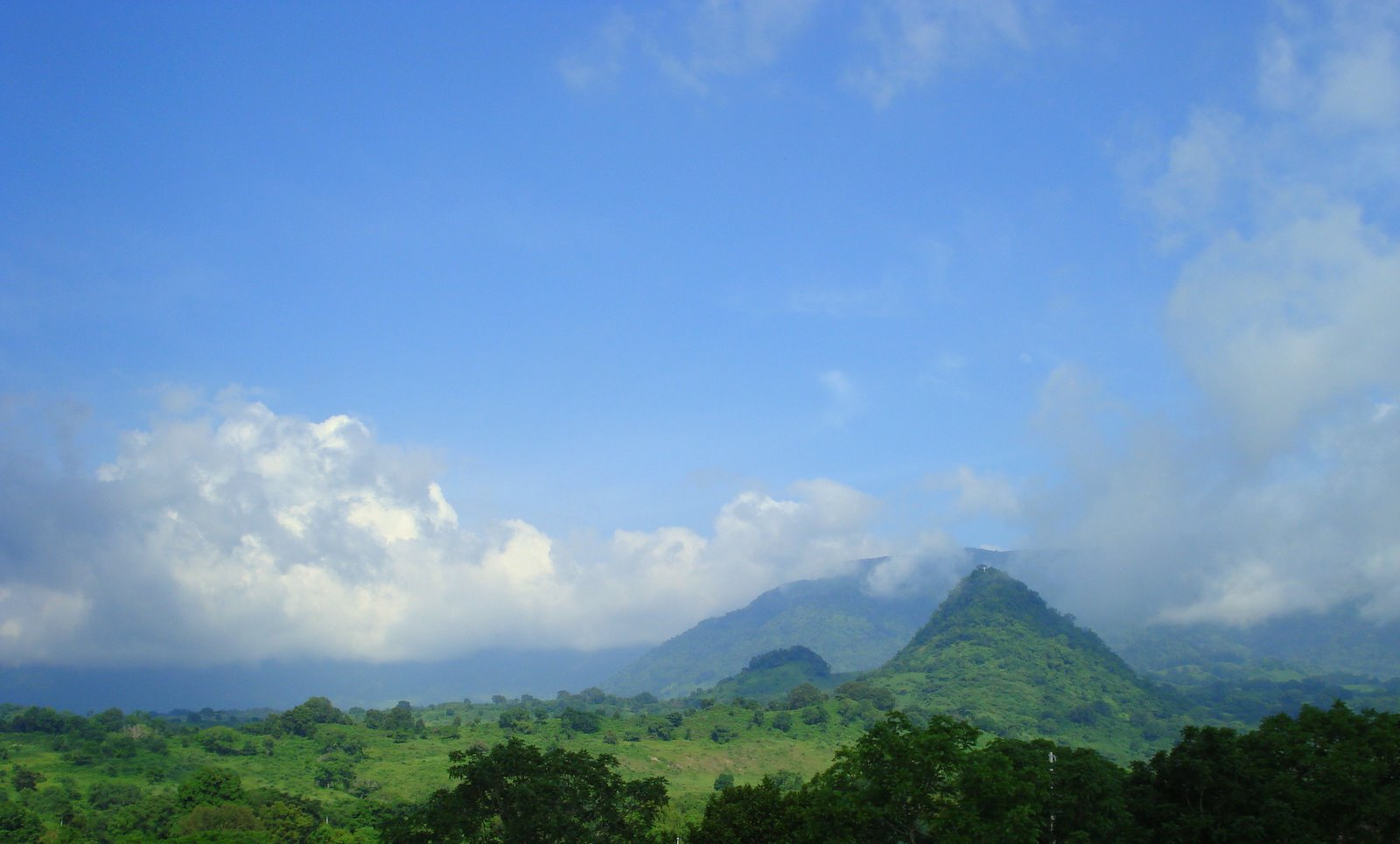 Vista de la Sierra de Otontepec desde Chontla, Veracruz